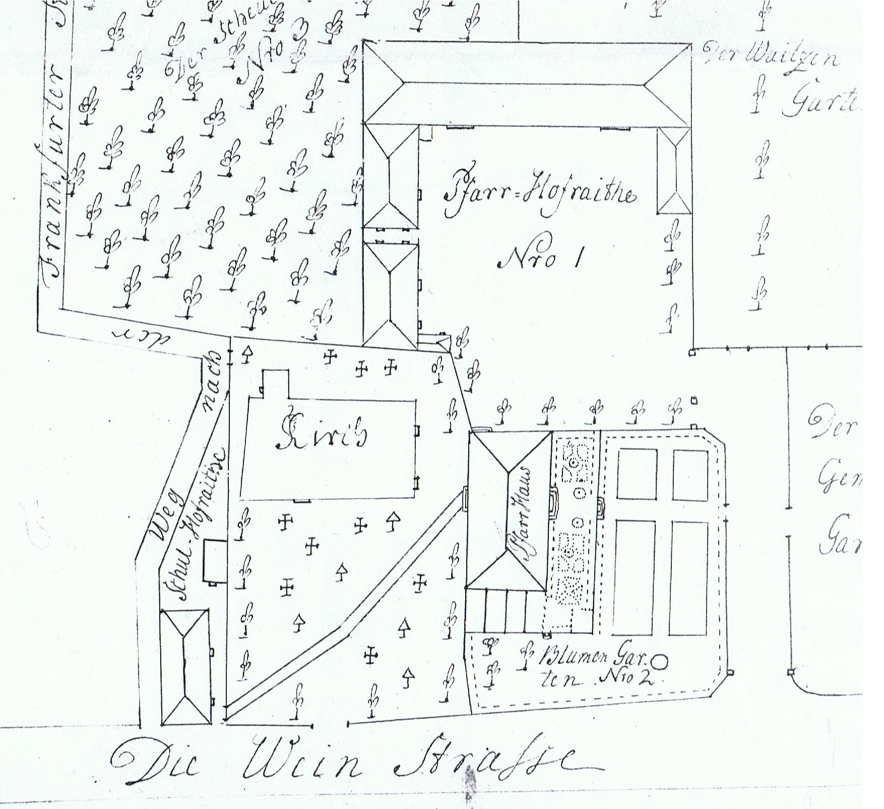 Lageplan des barocken Pfarrhofes aus dem späten 18. Jahrhundert